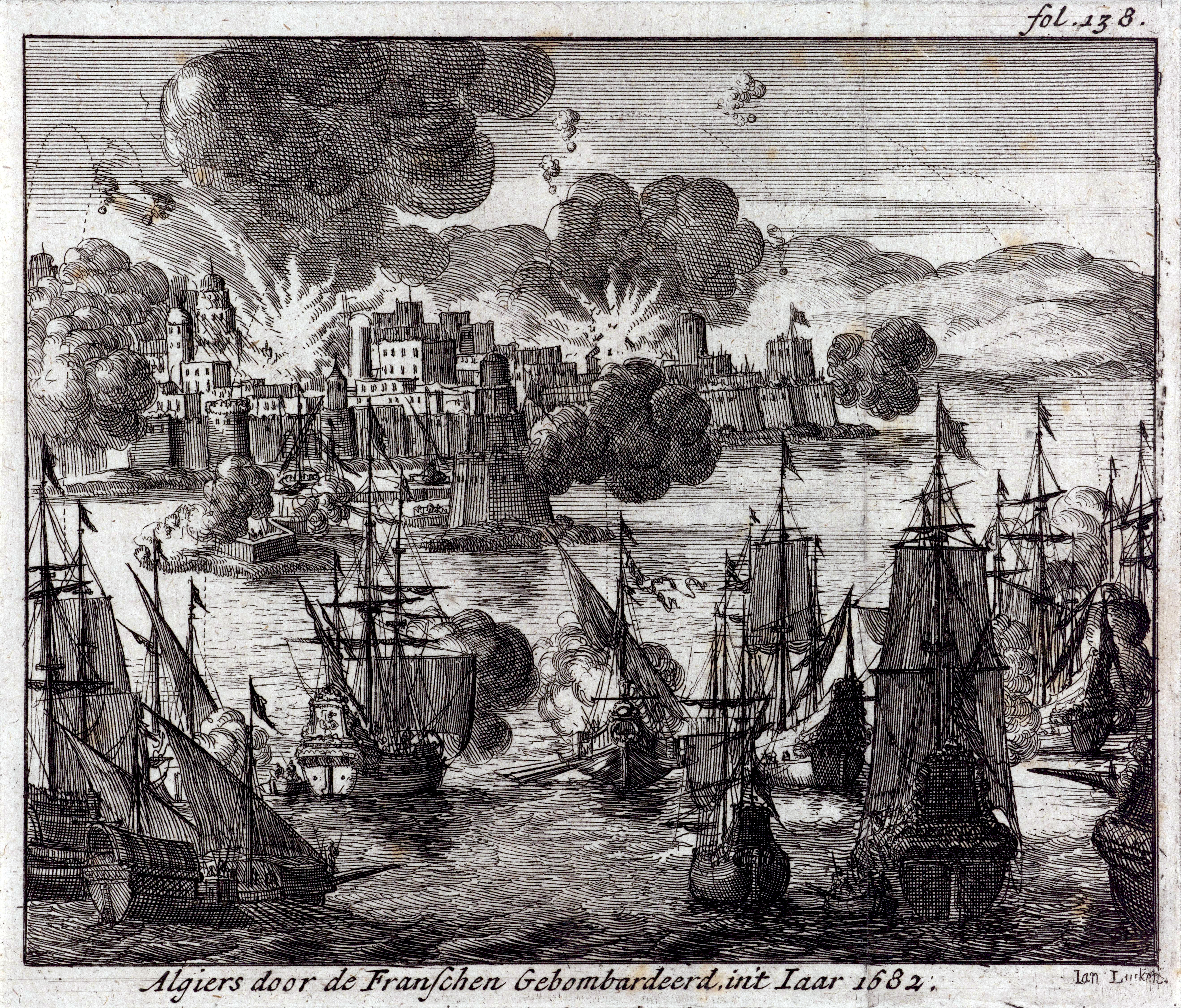 Gravure hollandaise. "Algiers door de Franschen Gebombardeerd init Iaar 1682" (lit. Alger que les Français bombardent en 1682")